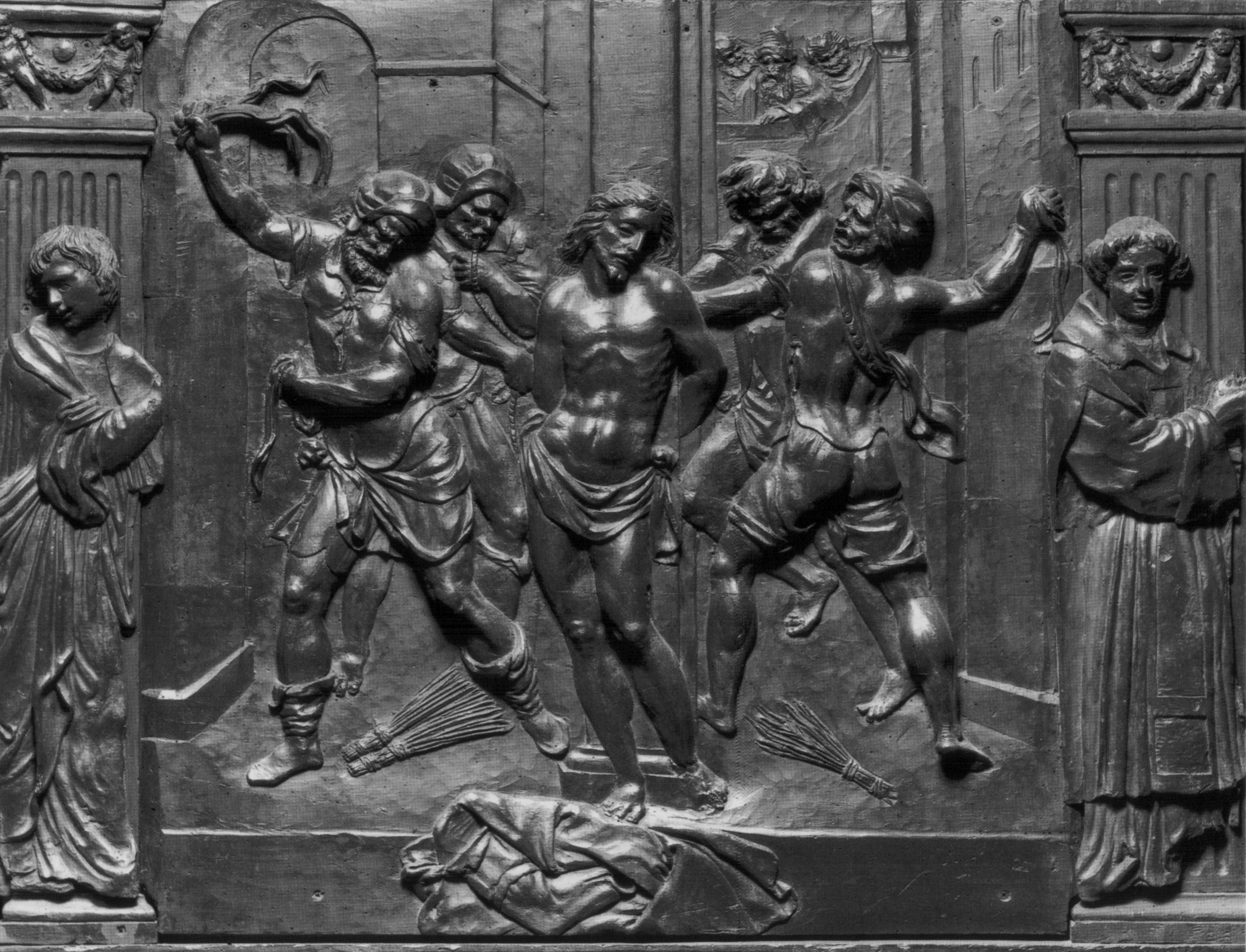 Il Pulpito della Passione, in San Lorenzo a Firenze, opera di Donatello. Dettaglio: Flagellazione, pannello aggiunto nel XVII secolo. Fotografia Alinari, 1852.